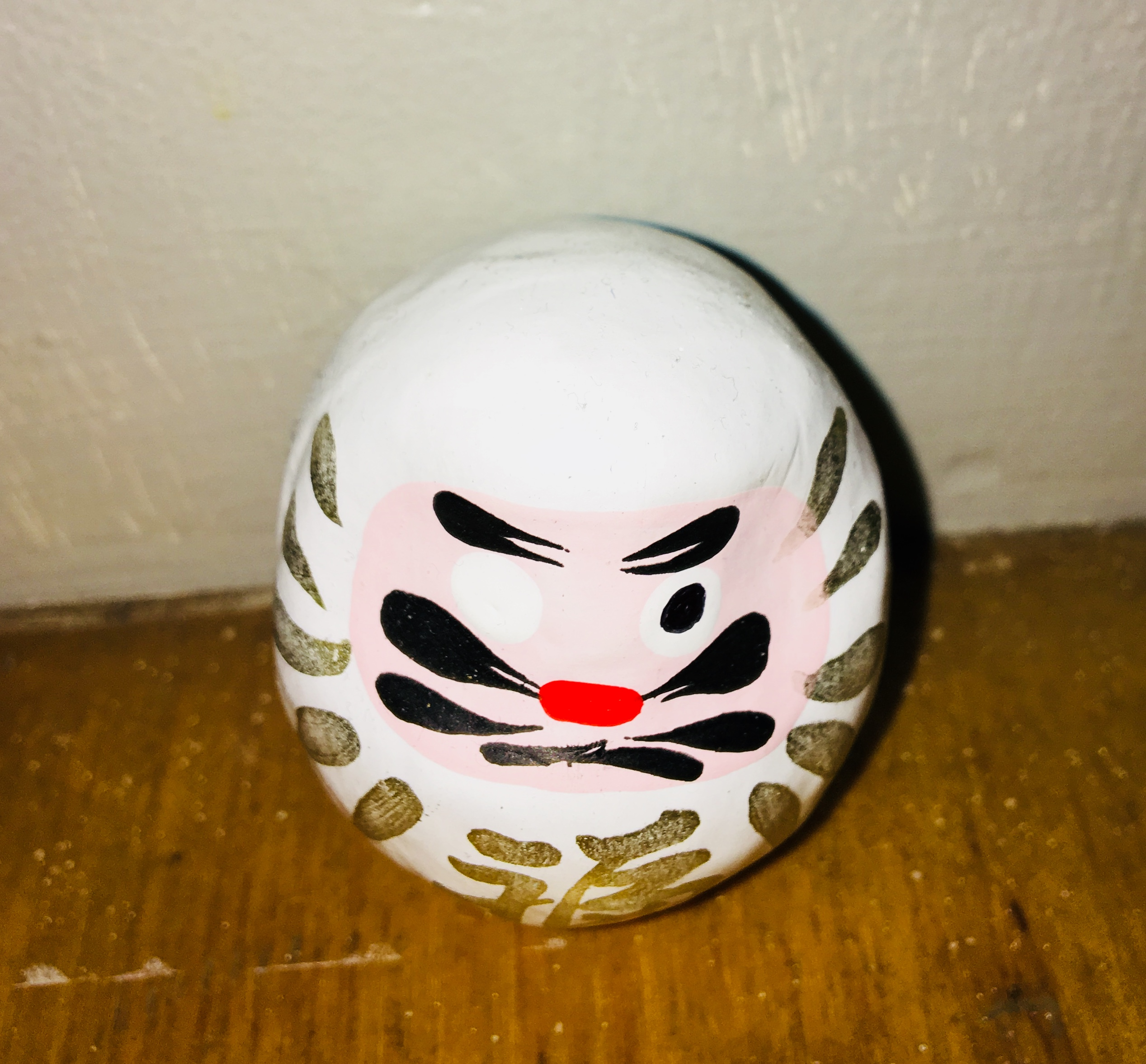 Daruma blanc venant de Tokyo